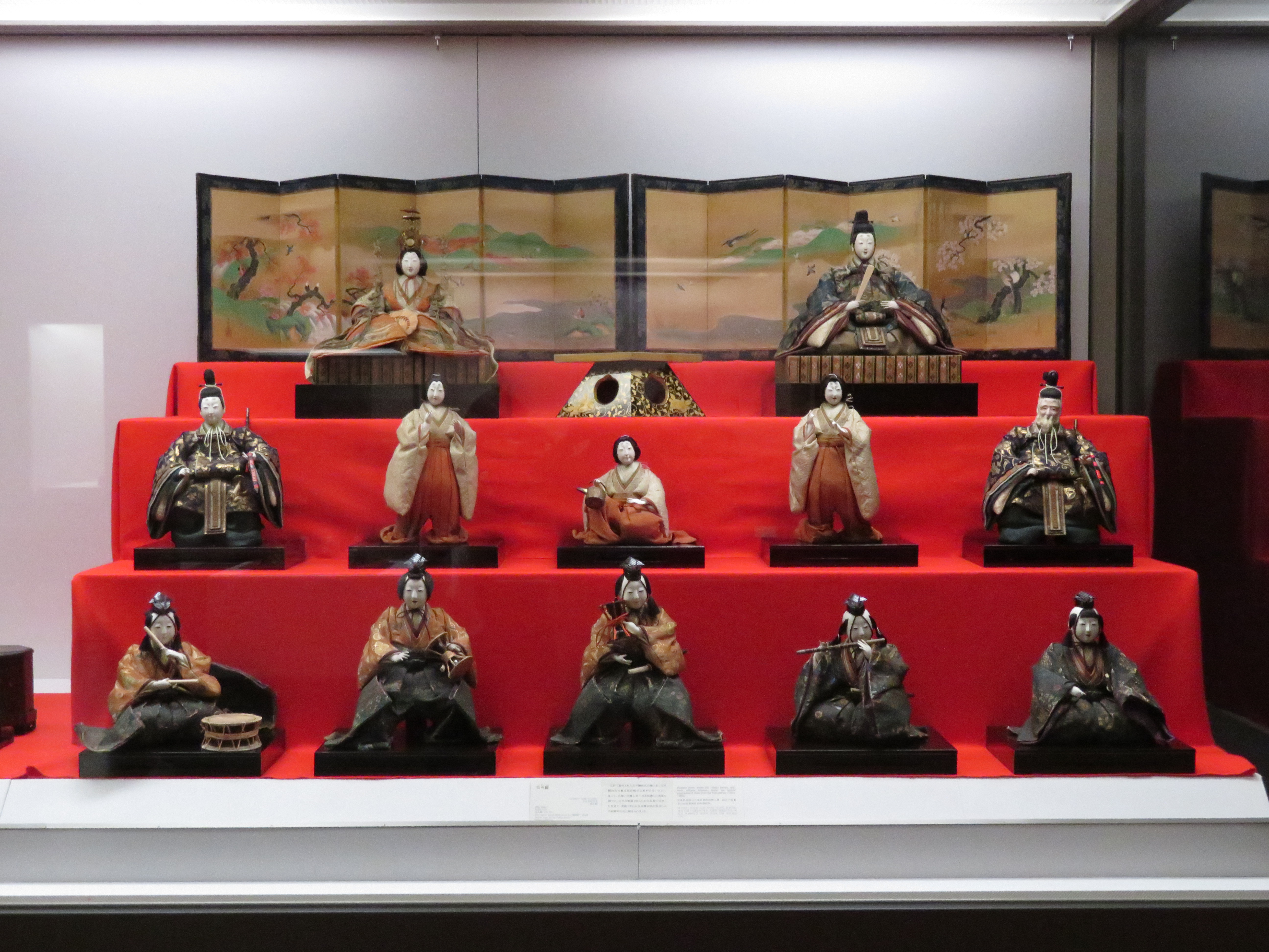 2018年2月27日-3月18日 東京国立博物館展示風景